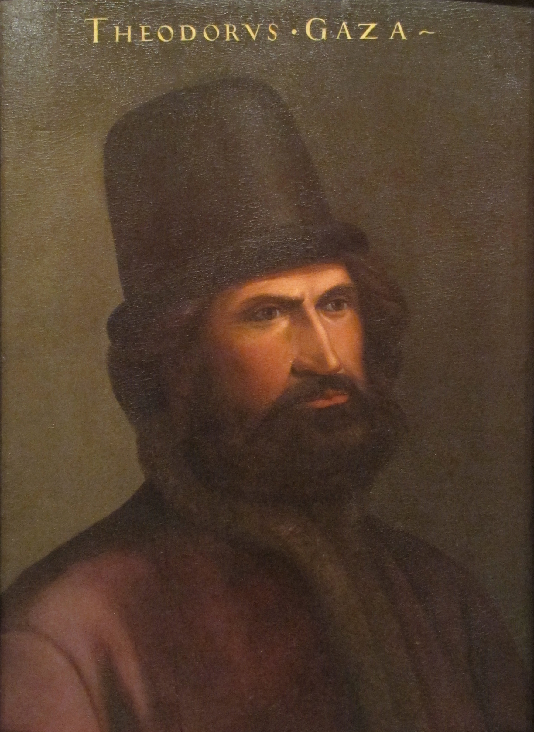 Cristofano dell'altissimo, teodoro gaza, 1556 crop